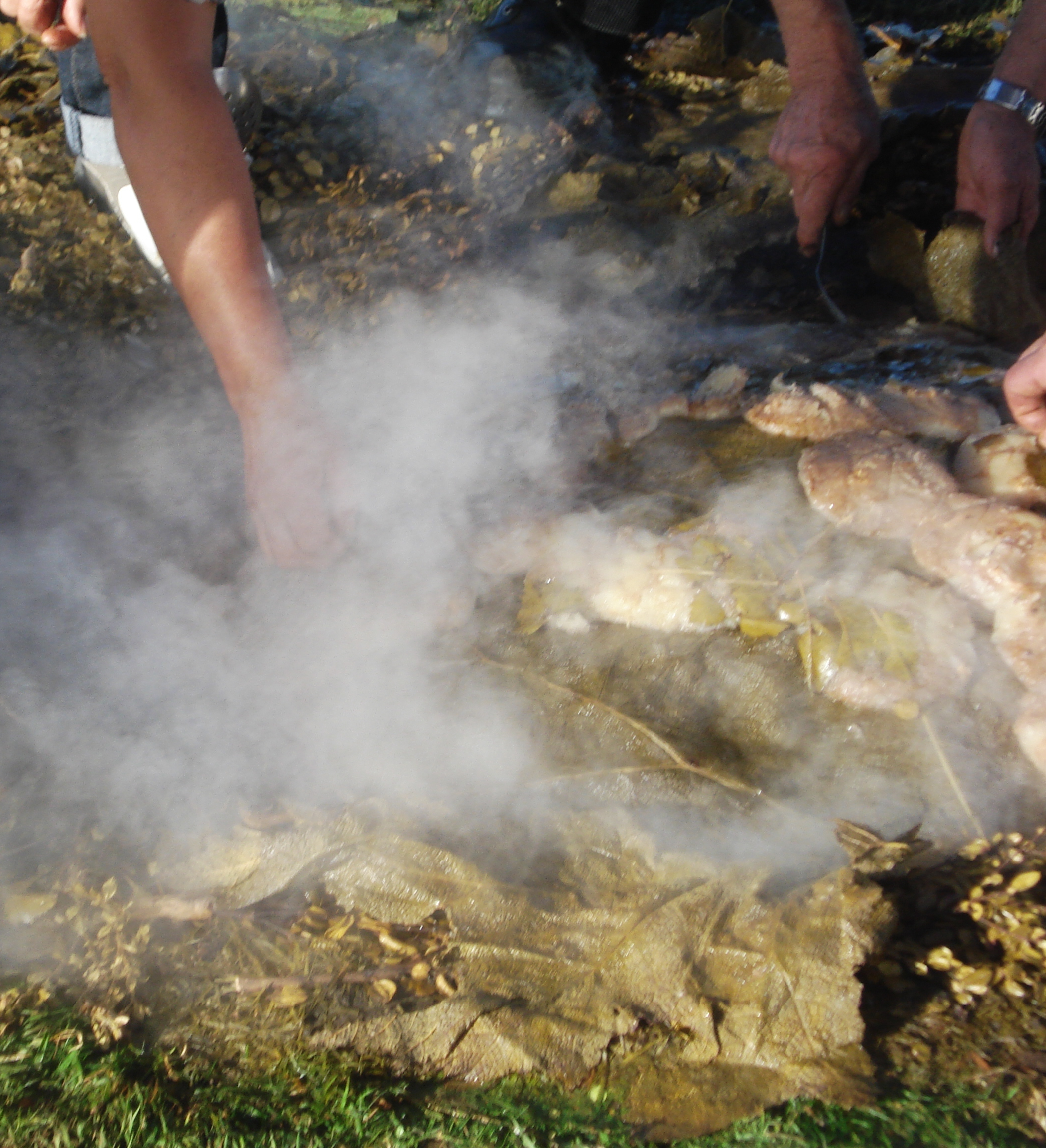 Destape de un curanto en Calen, comuna de Dalcahue, Chiloé, Chile.